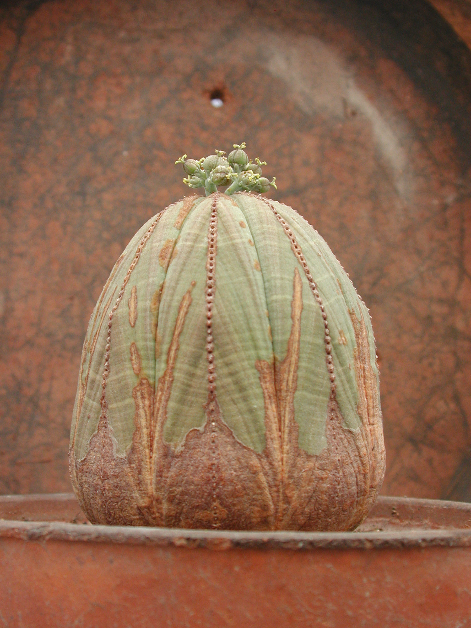 Euphorbia obesa, trabajo propio, 21 de mayo de 2005 Kauderwelsch